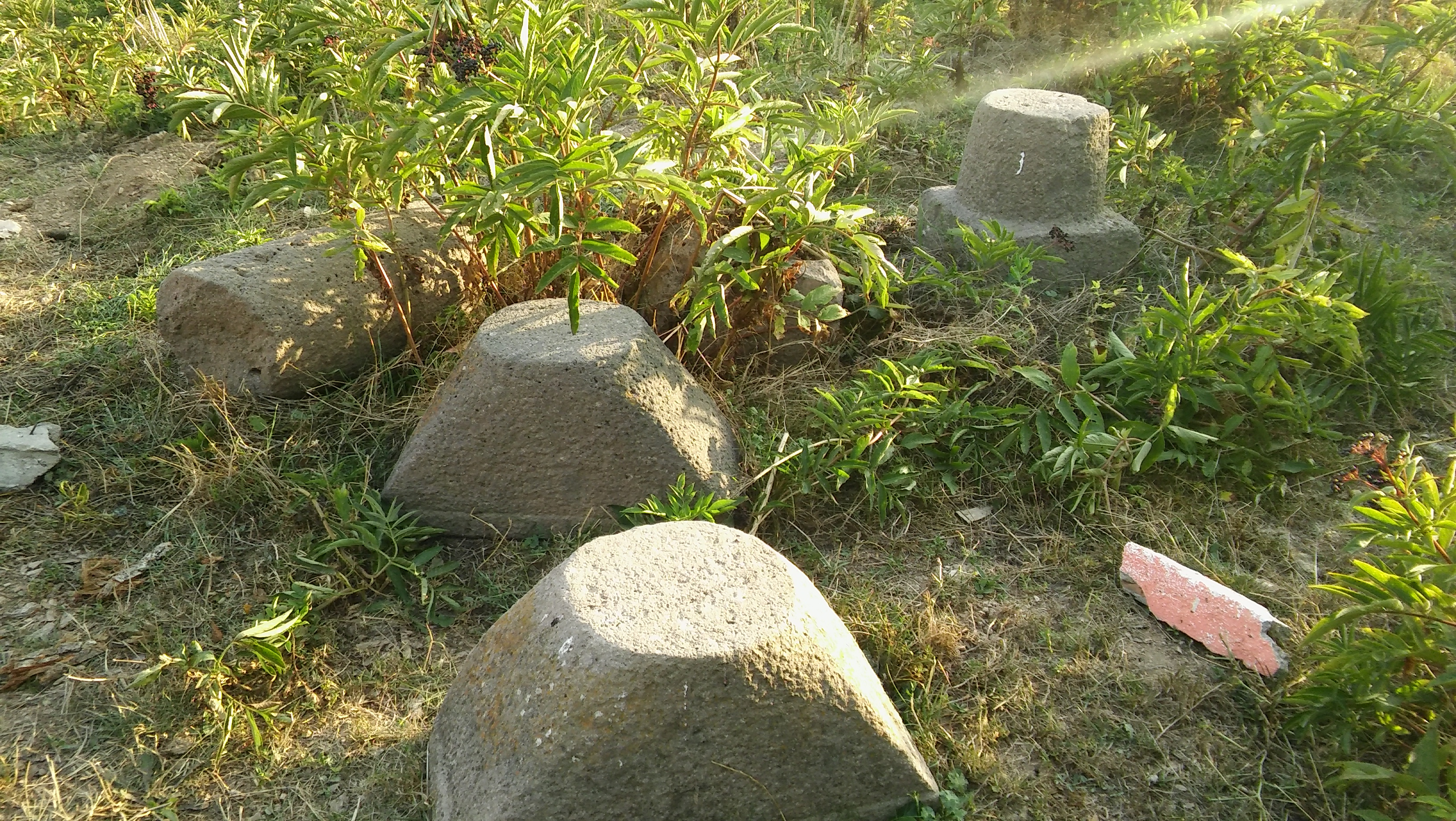 Tarihi kilise kalıntıları